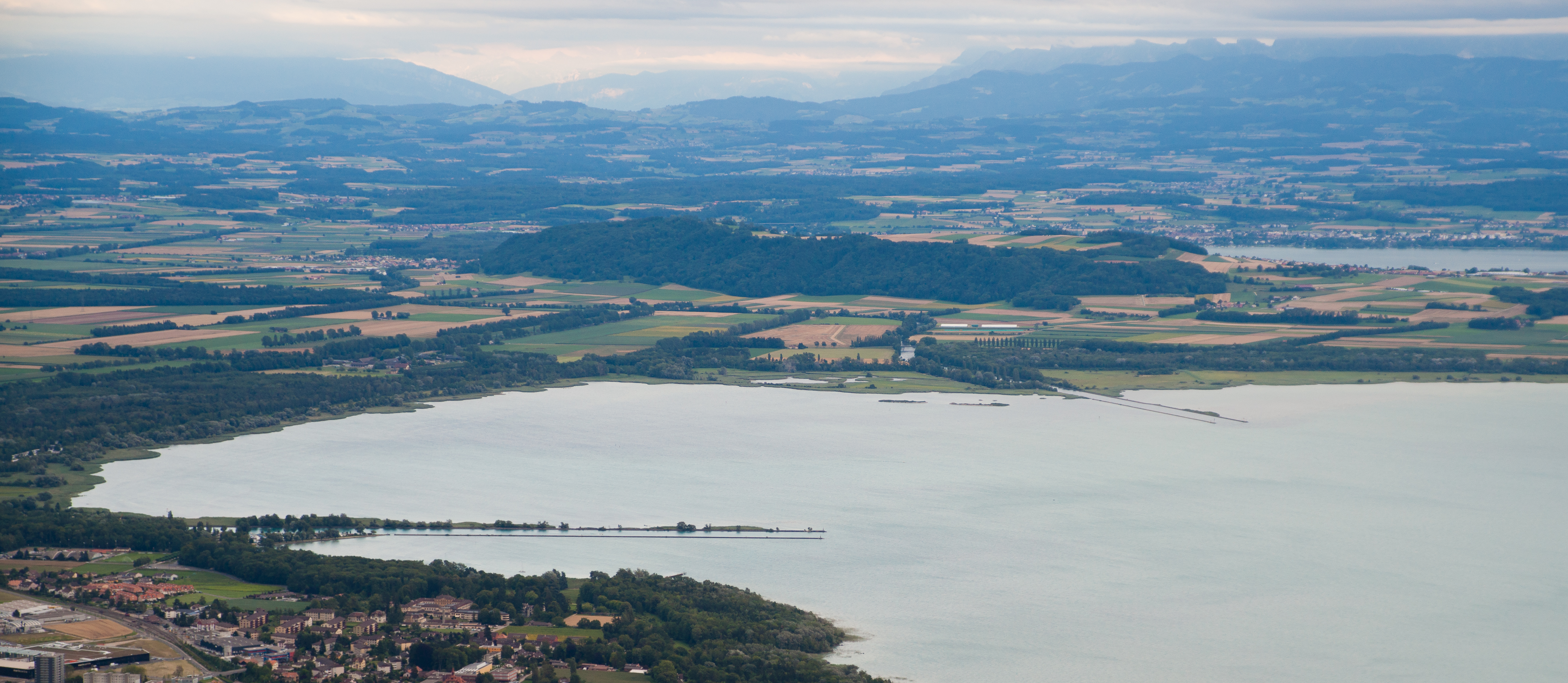 Correction des eaux du Jura depuis Chaumont